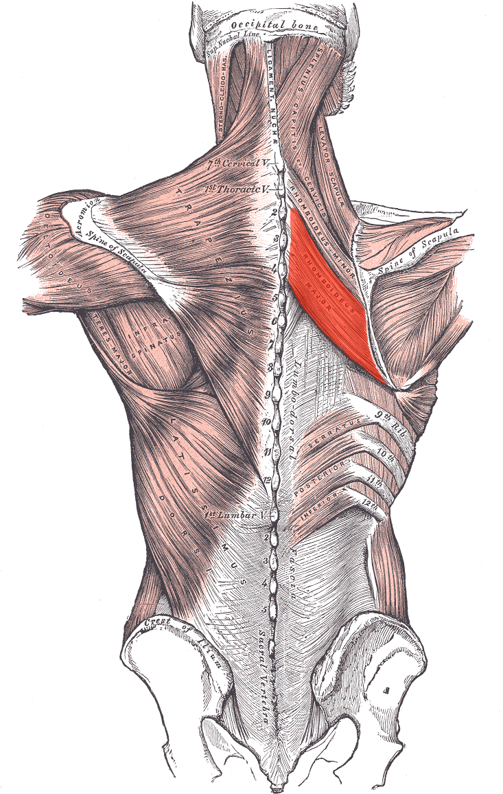 Rhomboideus major muscle